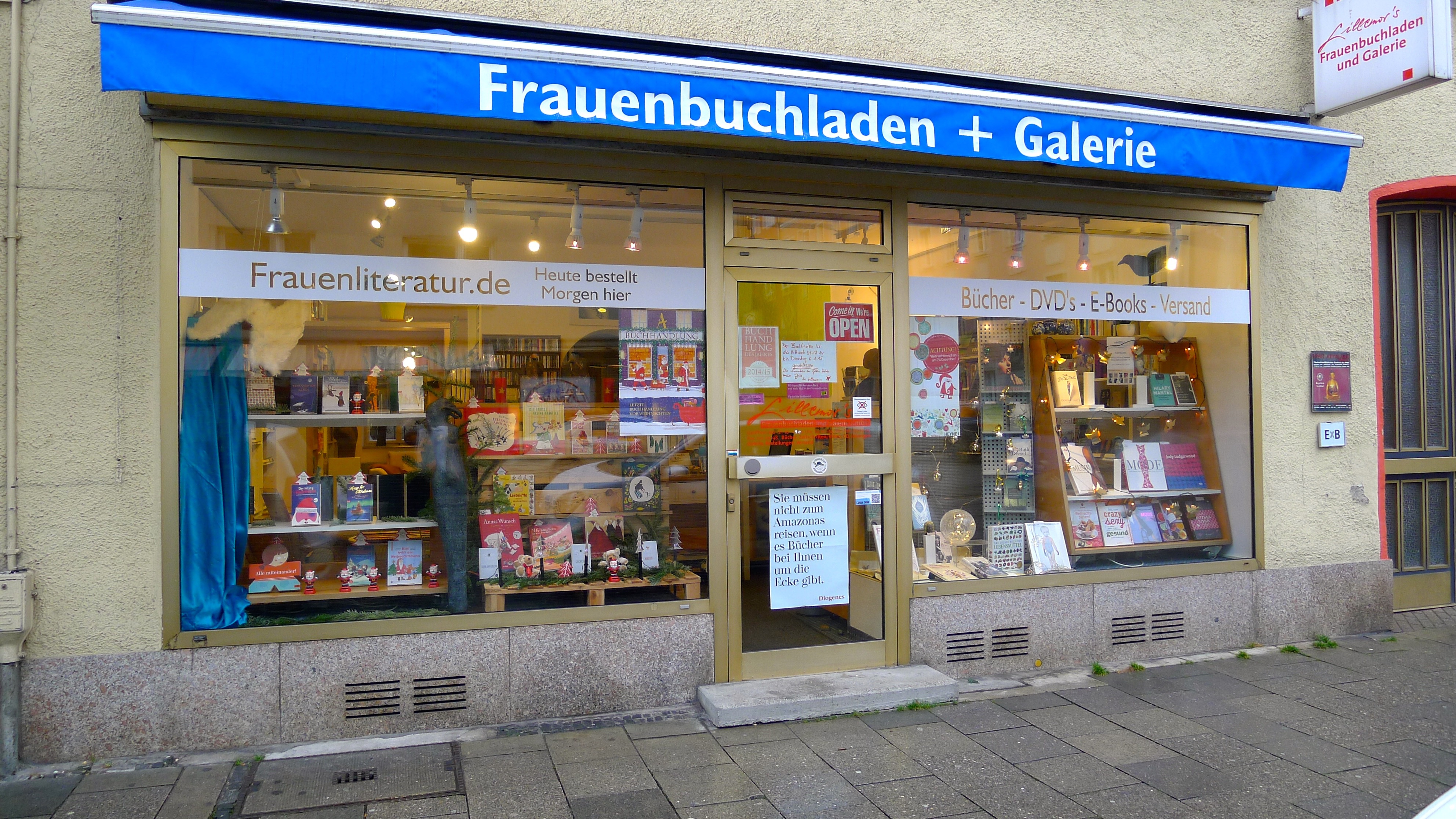 Frauenbuchladen "Lillemor's" in München, Barerstraße 70